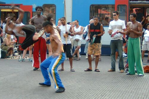 Capoeira